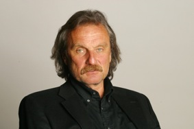 Christoph Ransmayr (Foto: Johannes Cizek)